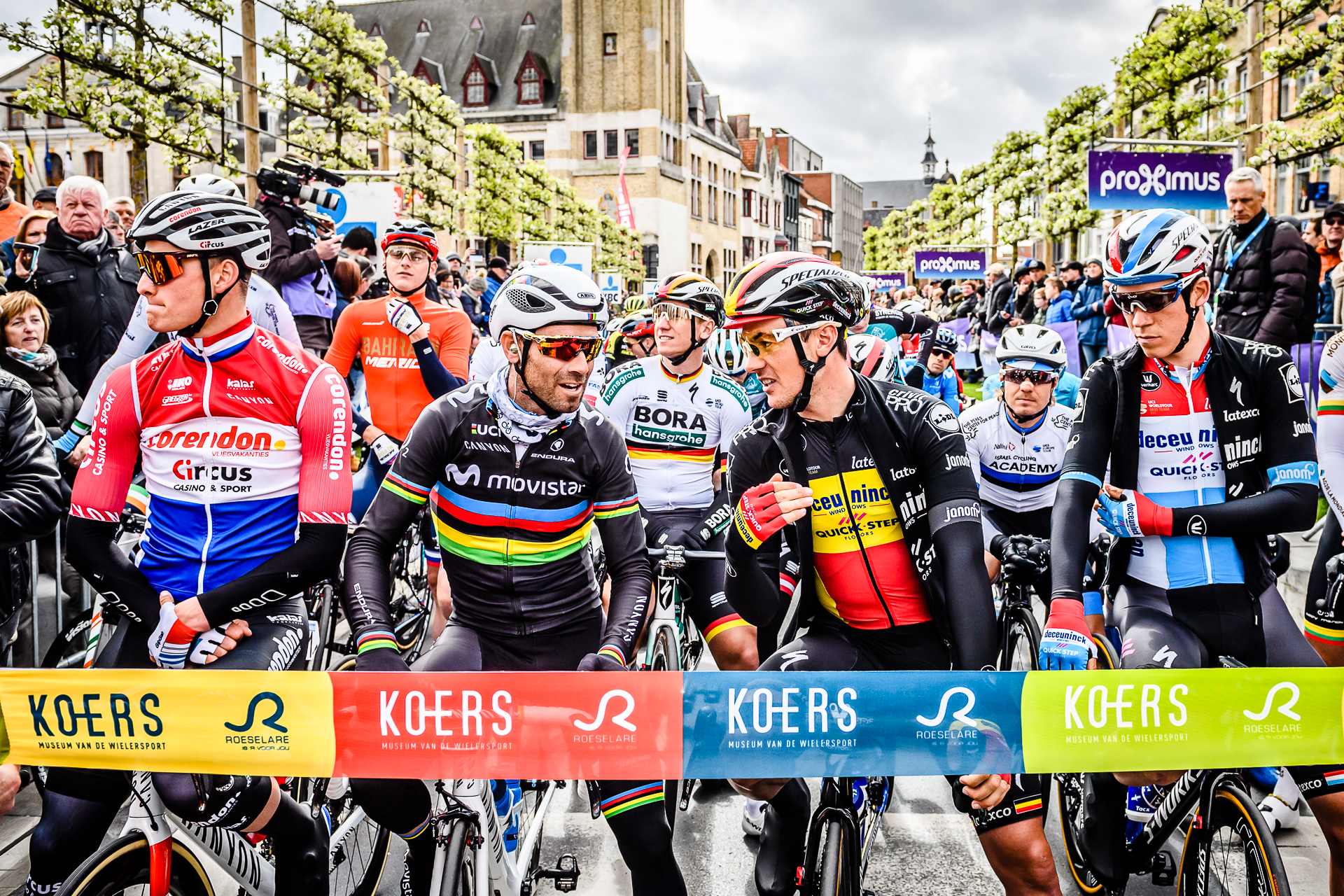 Op de Grote Markt van Roeselare (van links naar rechts): Nederlands kampioen Mathieu van der Poel (Corendon-Circus), Sloveens kampioen Matej Mohoric (Bahrai-Merida), wereldkampioen Alejandro Valverde (Movistar), Duits kampioen Pascal Ackermann (Bora-Hansgrohe), Belgisch kampioen Yves Lampaert (Deceuninck - Quick-Step), Ests kampioen Mihkel Räim (Israël Cycling Academy), Bob Jungels, kampioen van Luxemburg (Deceuninck -Quick-Step) en Gediminas Bagdonas (AG2R-La Mondiale), kampioen van Litouwen